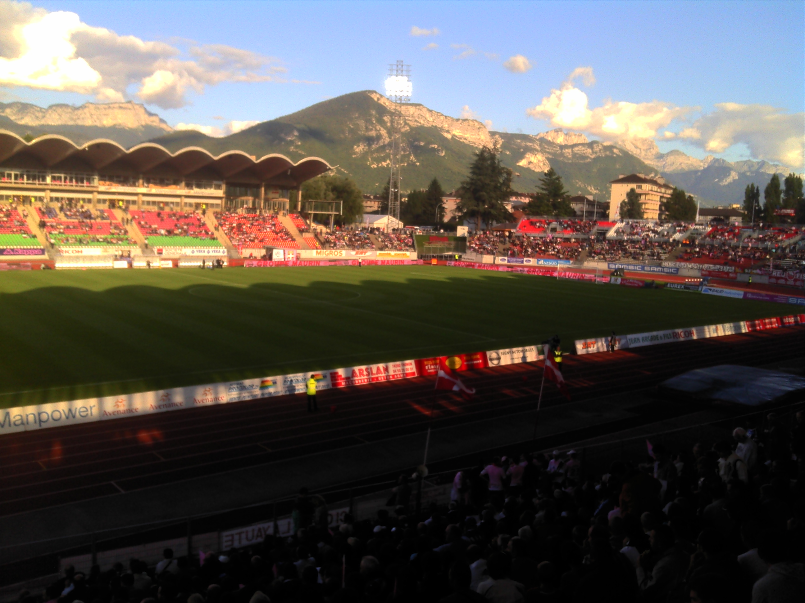 Parc des Sports d'Annecy : Evian TG - Dijon (le 27 Août 2011)